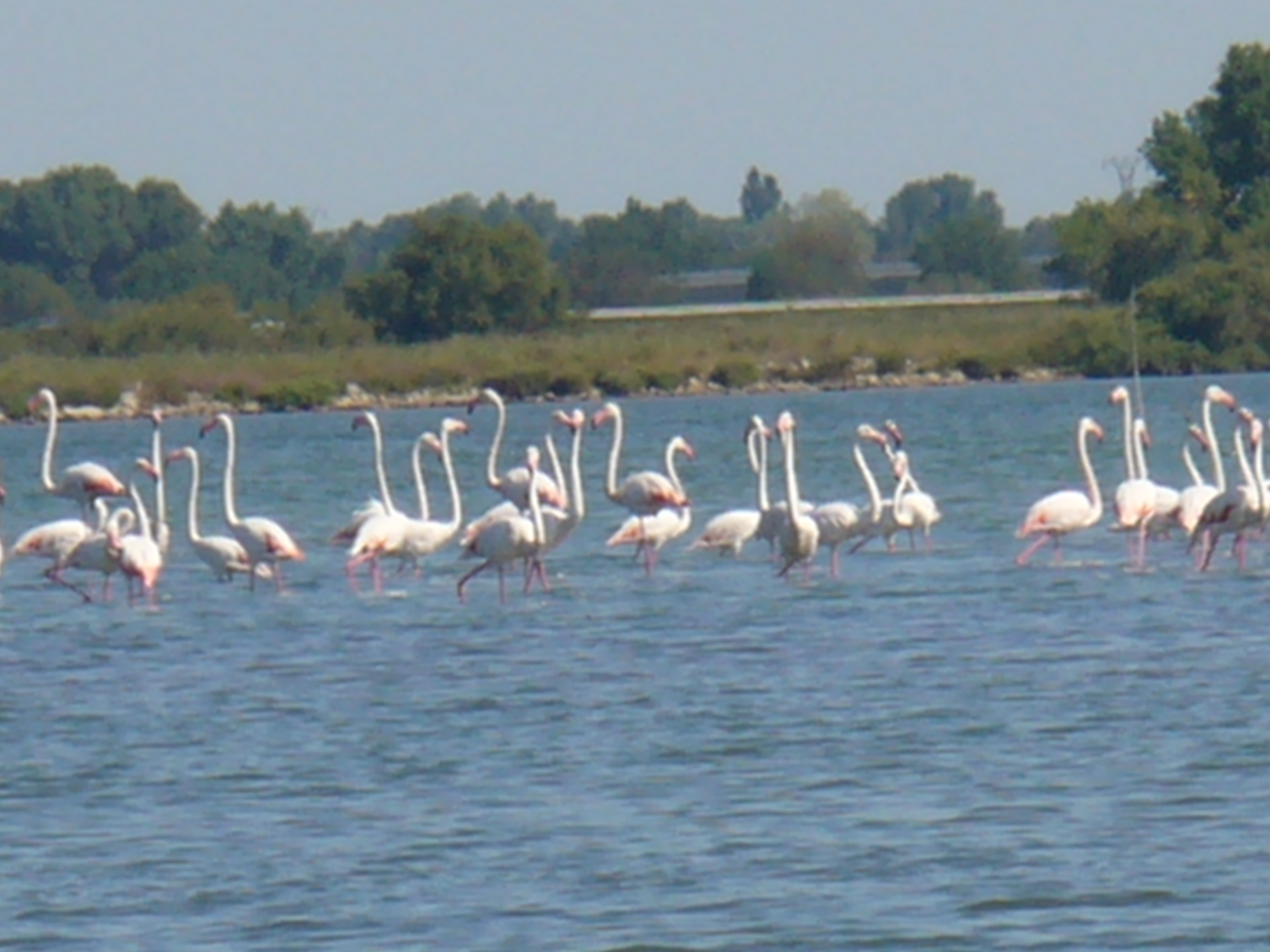 Flamingos in der Nähe der Stadt Le Grau du Roi in Südfrankreich